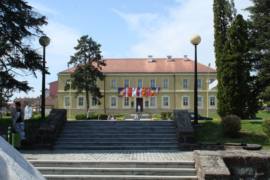 Зграда старог суда на главном градском тргу, поглед из улаза у градски парк, Горњи Милановац.